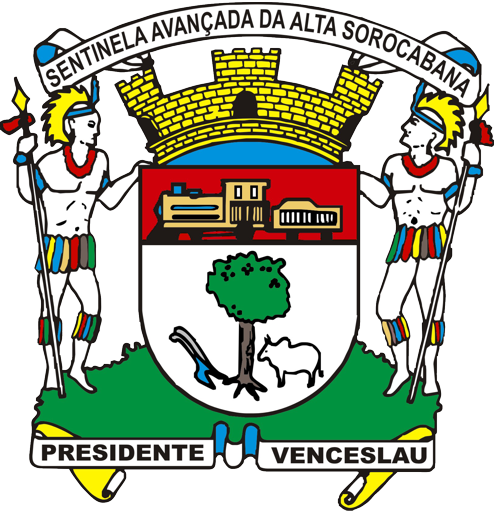 Brasão do município de Presidente Venceslau, estado de São Paulo, Brasil.